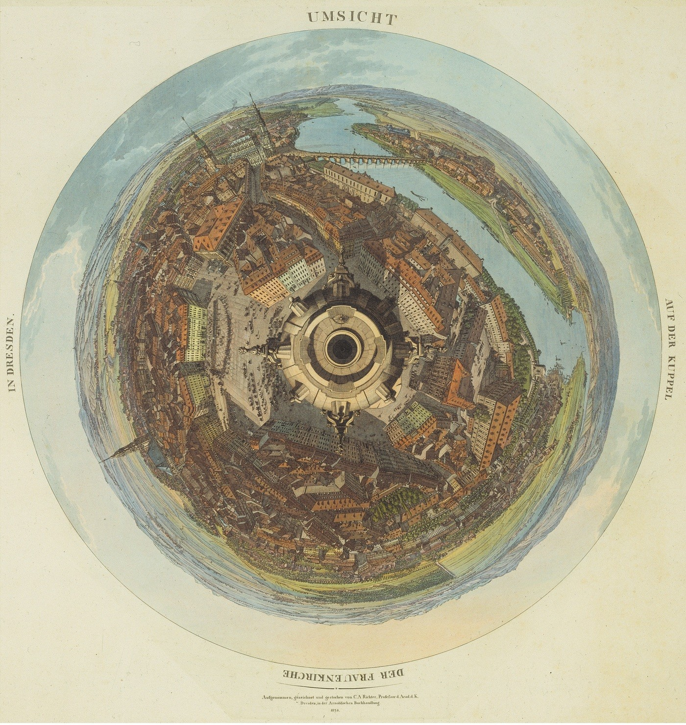 "Umsicht auf der Kuppel der Frauenkirche in Dresden". 1824. Umrißradierung, koloriert. "Aufgenommen, gezeichnet und gestochen von C.A. Richter, Professor d. Acad.d.K./Dresden, in der Arnoldischen Buchhandlung./1824".